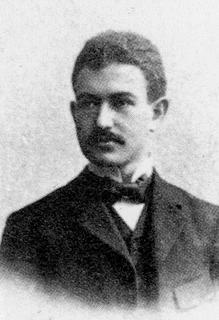 Oskar Pollak (1883-1915), Český historik umění.